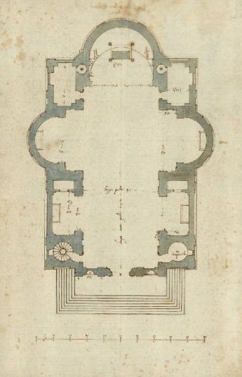 Grundrissplan della Portas für Sant'Atanasio dei Greci